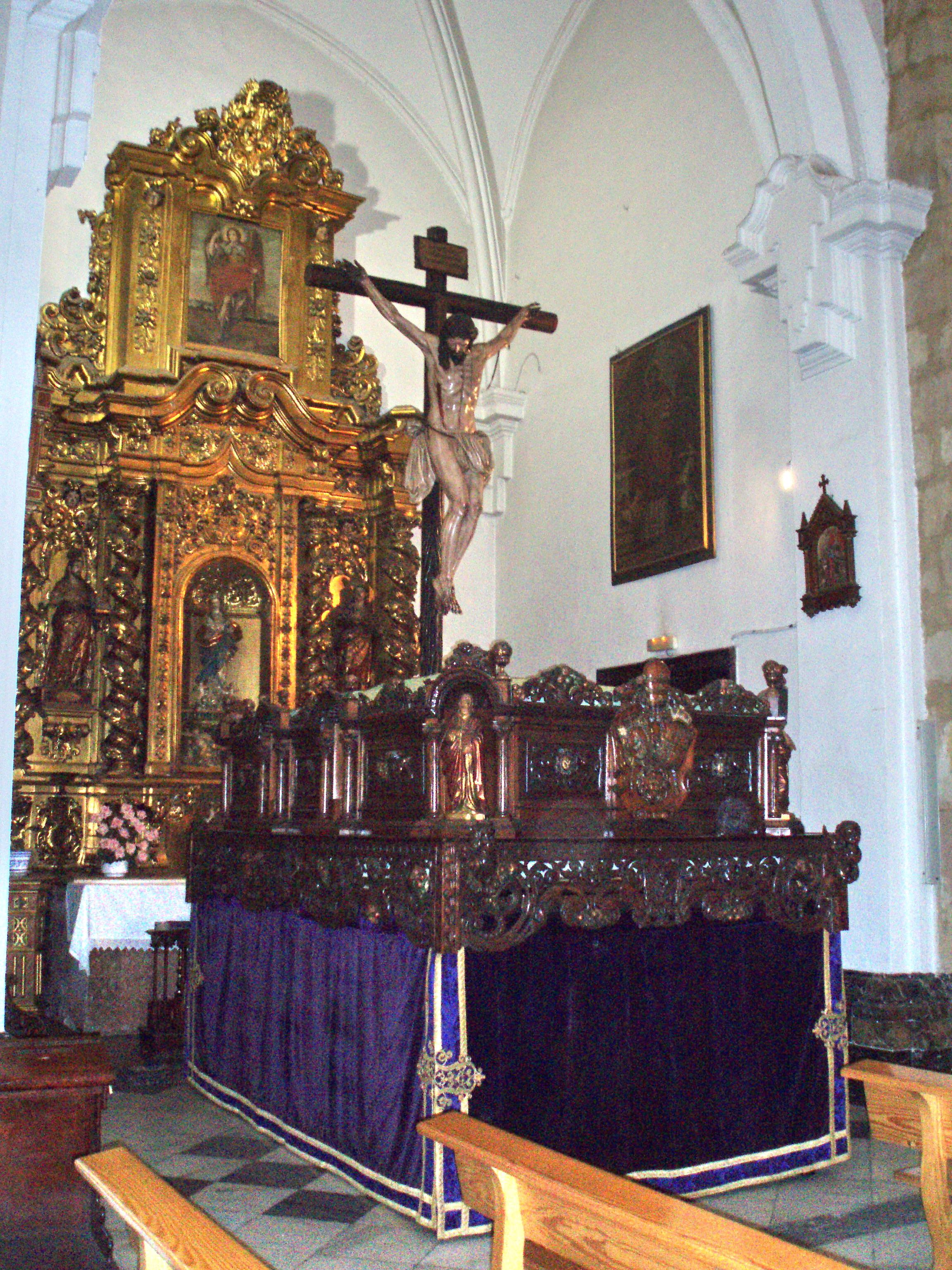 Paso del Santísimo Cristo de la Buena Muerte en la iglesia de San Hipólito de Córdoba, provincia de Córdoba, (España).